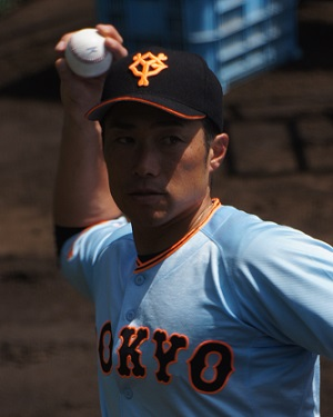 Giants aikawa